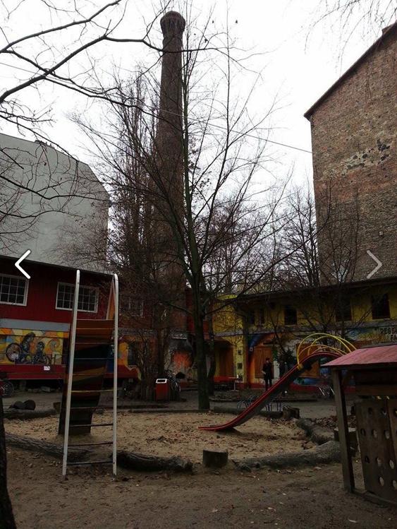 Regenbogenfabrik (Platz und Kamin) – 1981 besetztes und heute legales Alternativprojekt in Berlin-Kreuzberg, Germany.